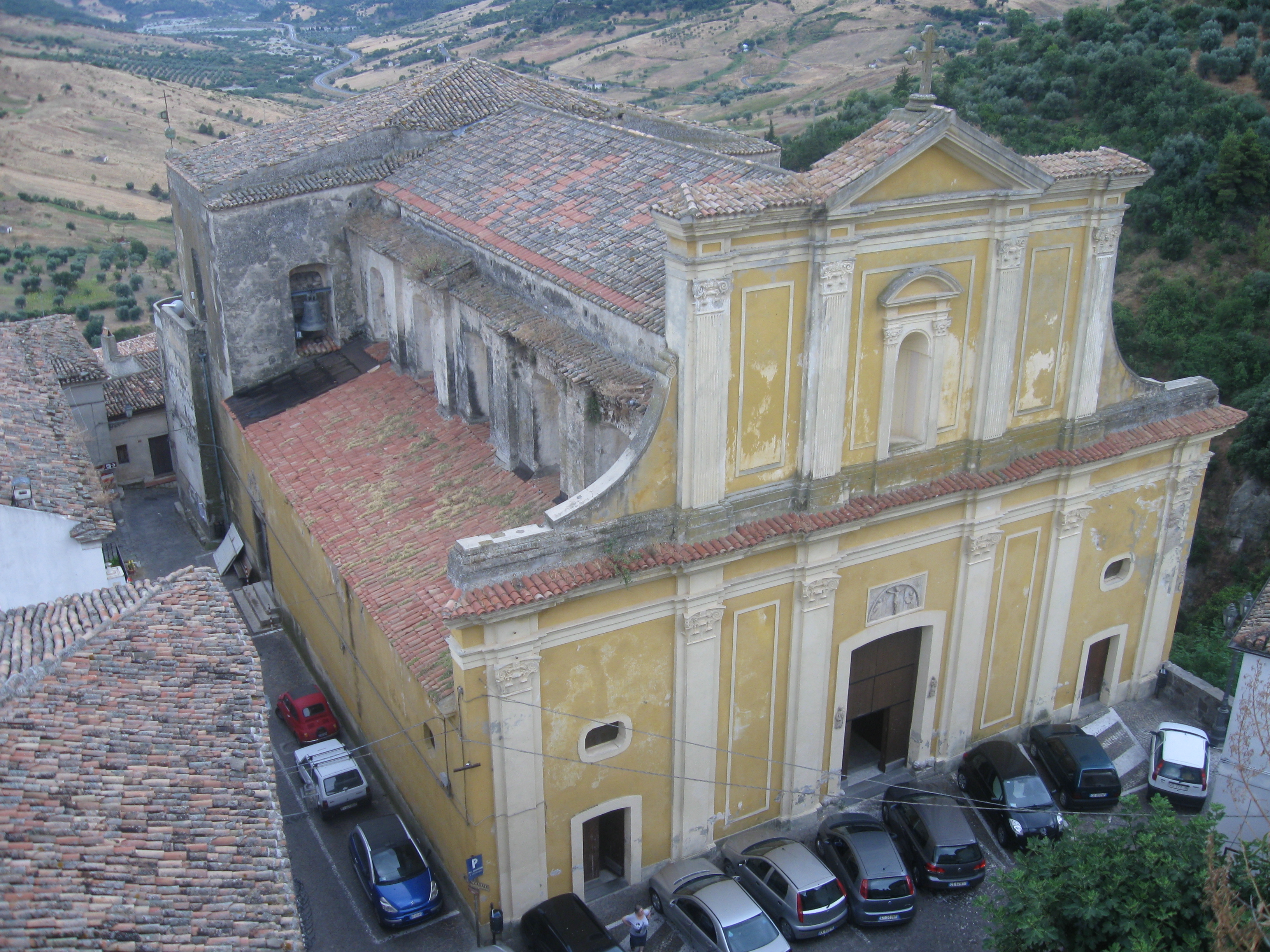 La Chiesa Madre di Oriolo (Cosenza)